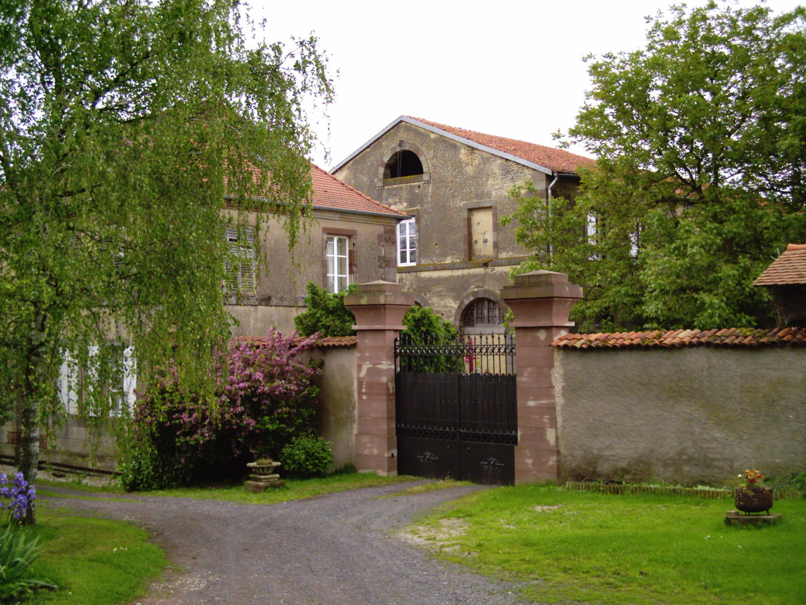 Marsal 57 France, Maison du gouverneur, arsenal à l'arrière plan